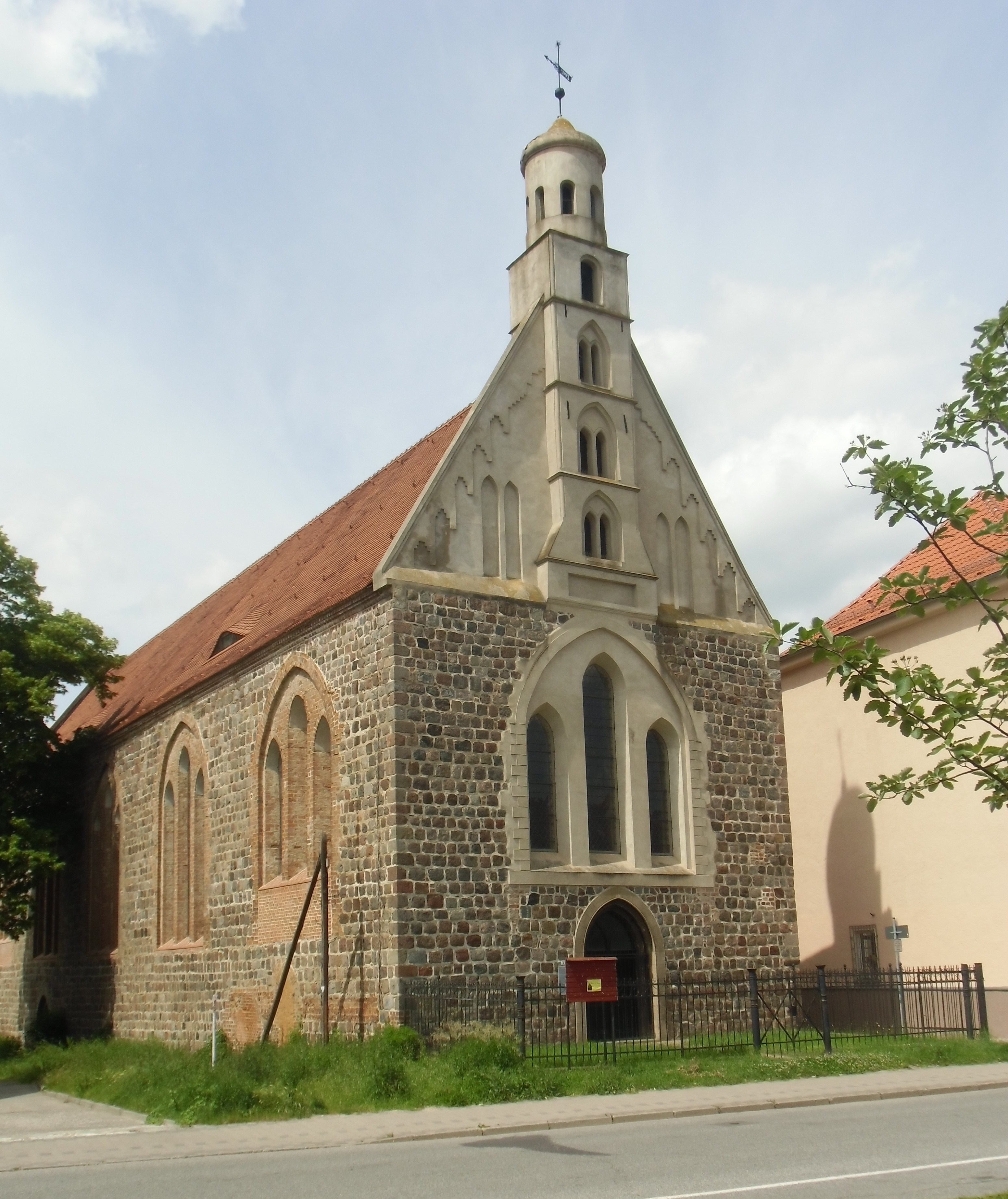 Kirche des ehemaligen Franziskanerklosters, entstanden im 13. Jahrhundert in der Klosterstraße von Prenzlau